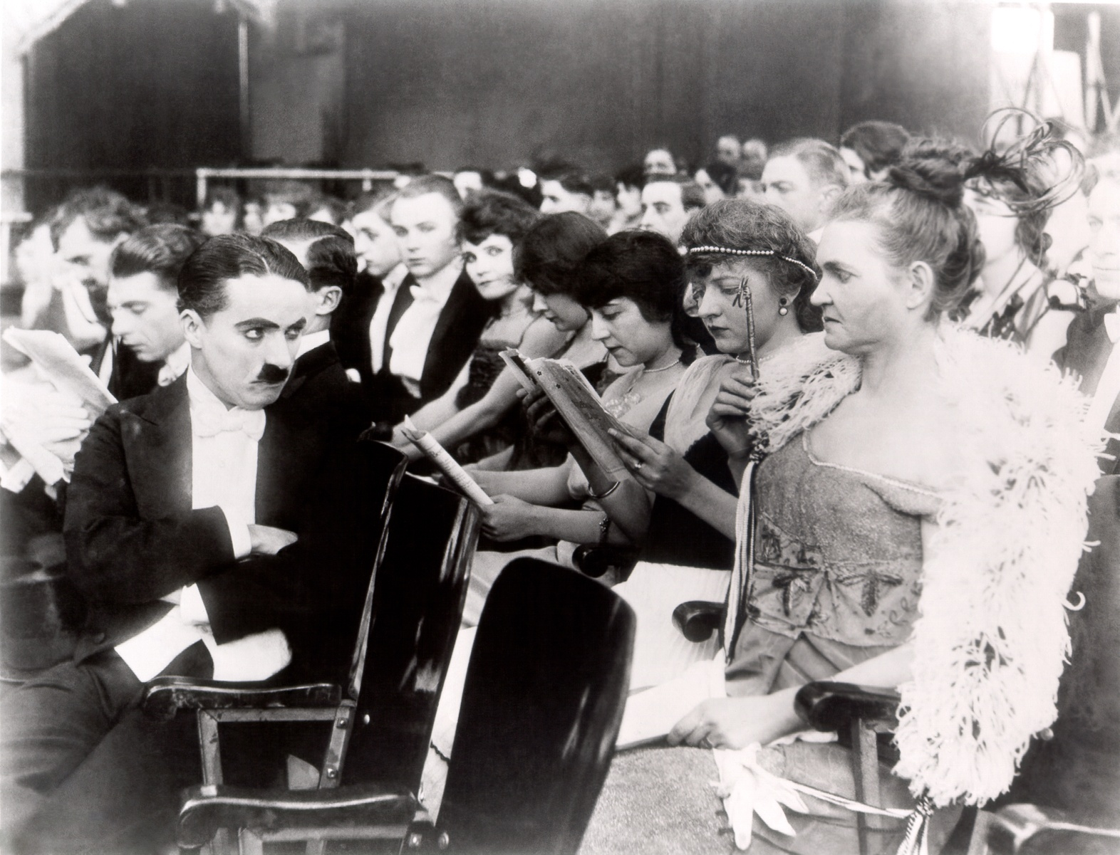 fotografía de la película A night in the Show de 1915